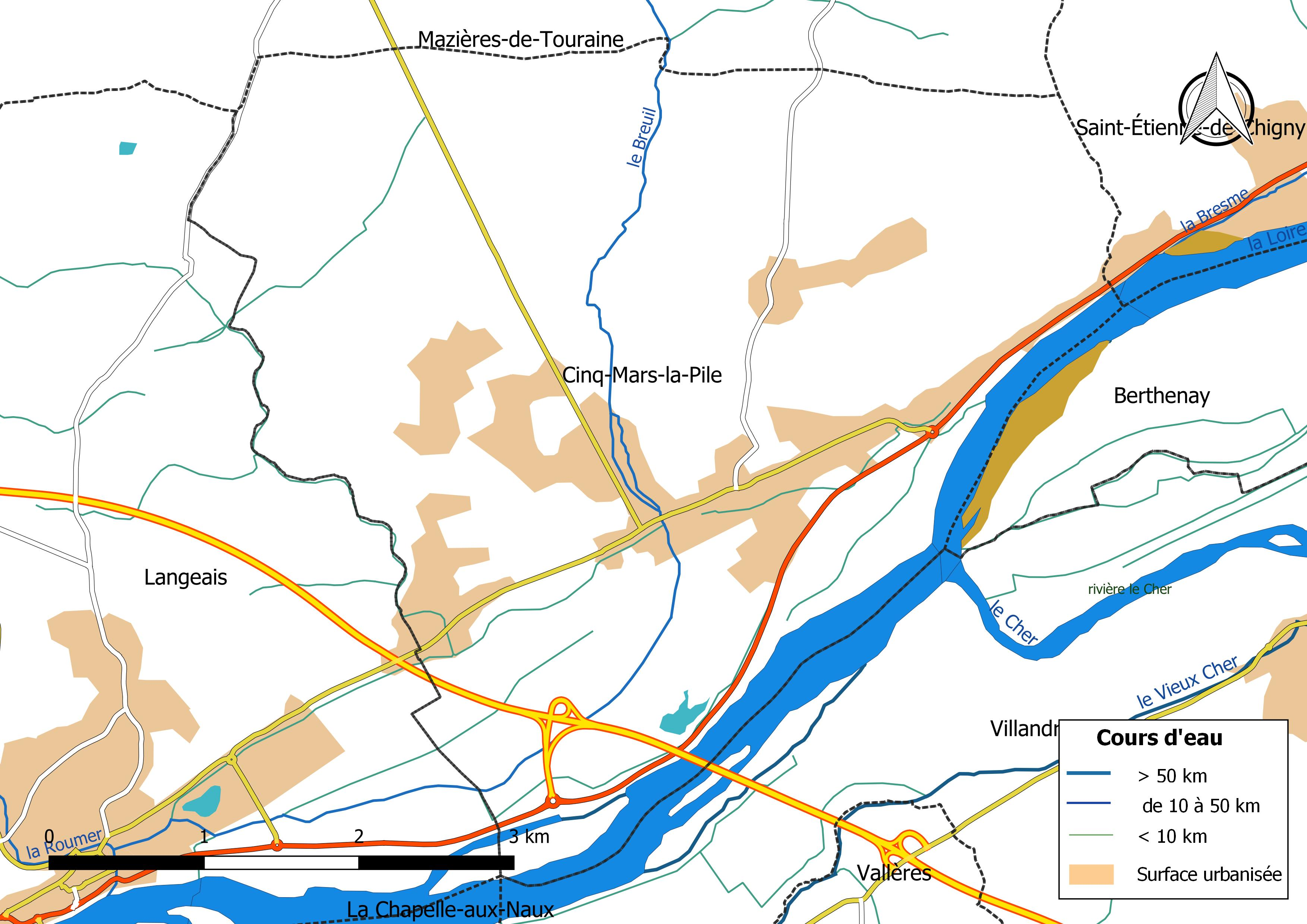 Carte du réseau hydrographique de la commune de Cinq-Mars-la-Pile (France).